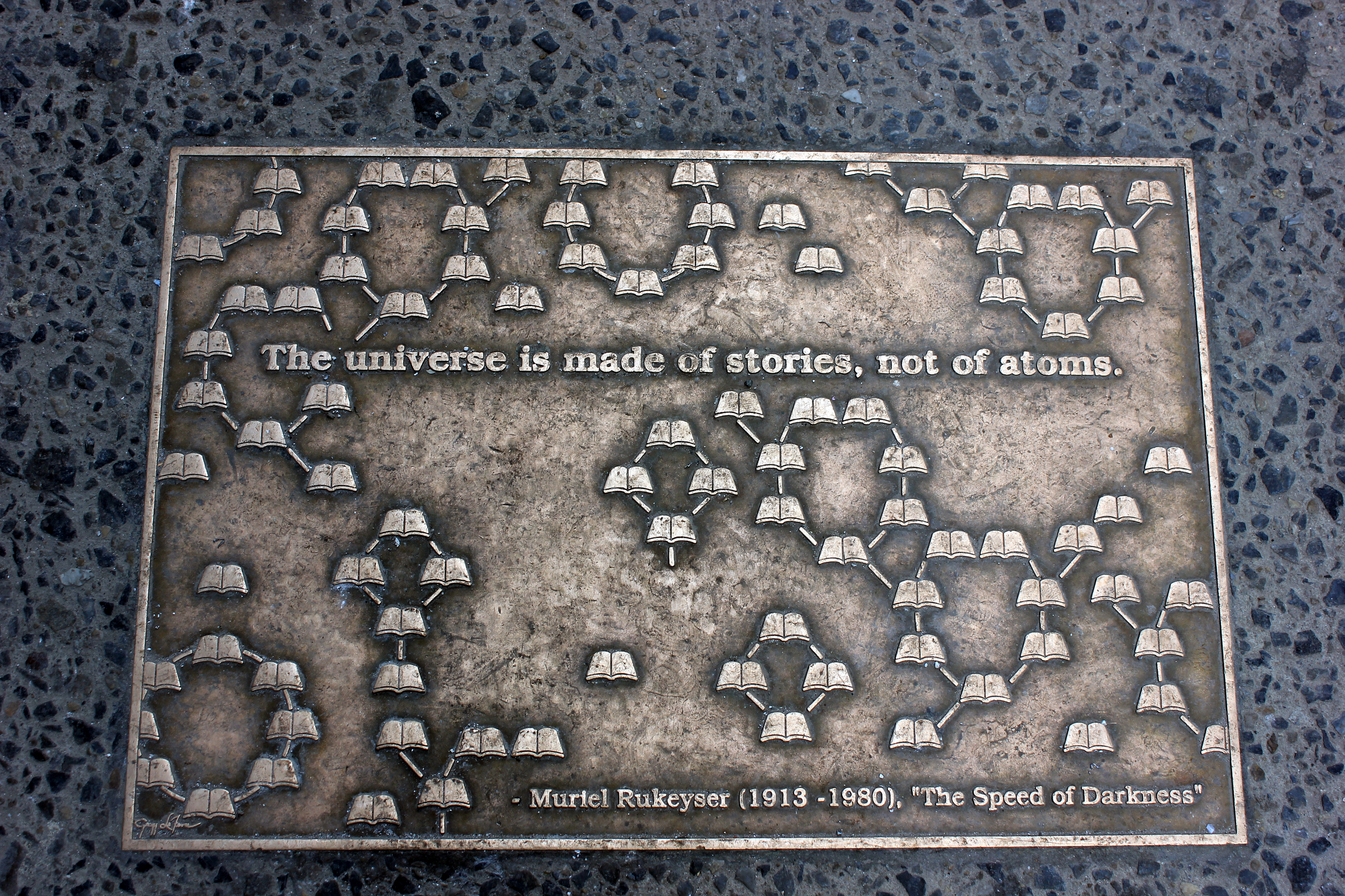 Library Walk New York City